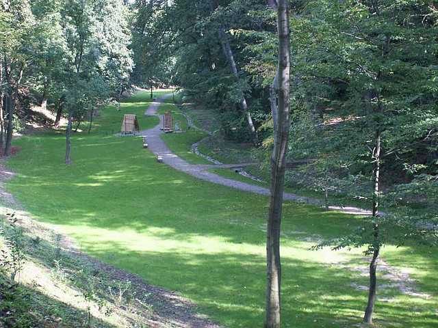 Park